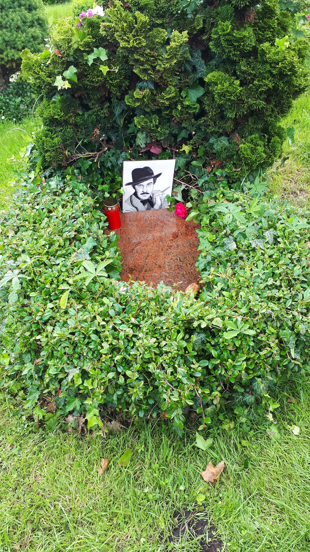 Foto von dem Grab des Schauspielers Ferdinand Marian auf dem Münchner Nordfriedhof.